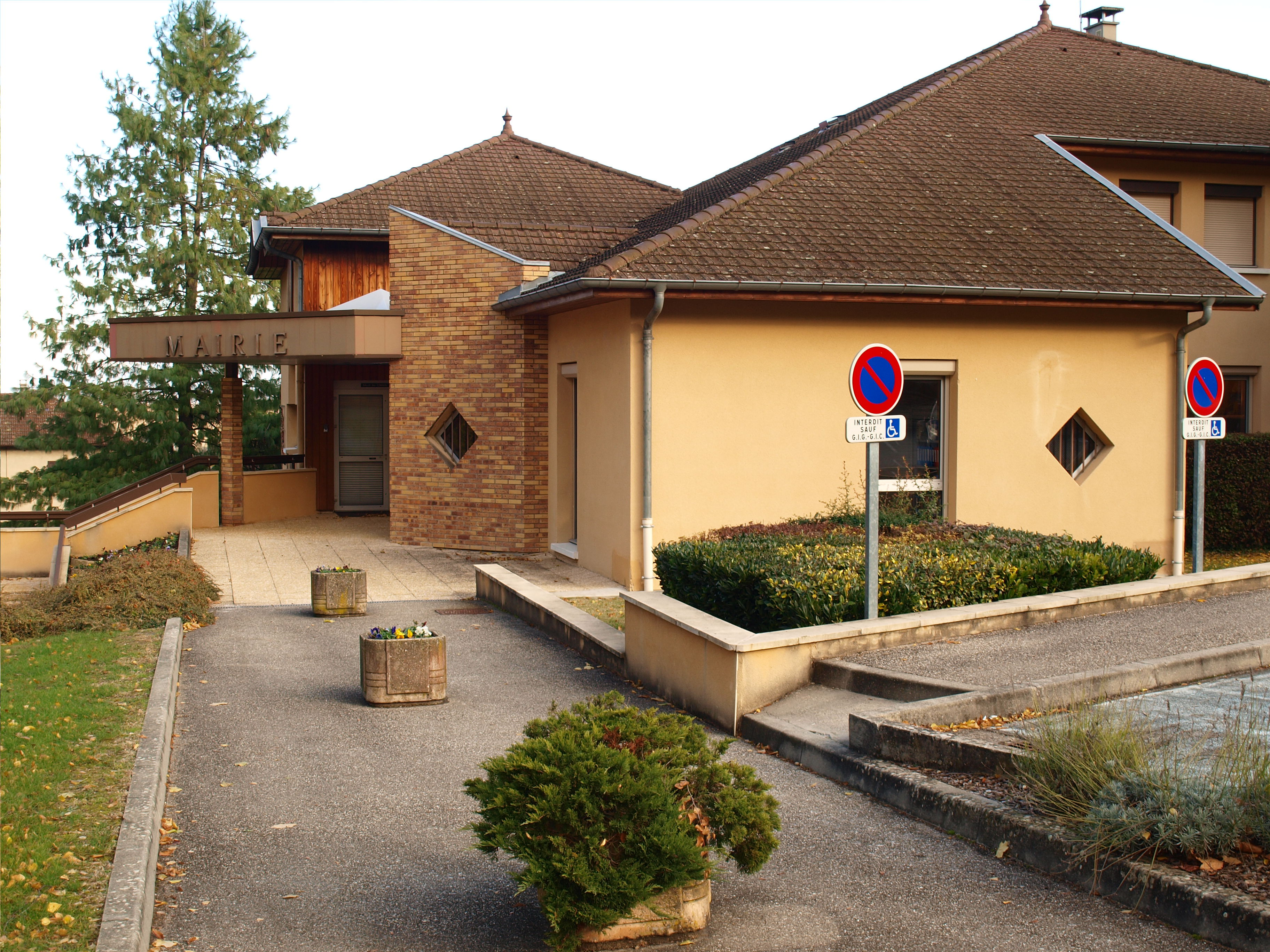 Domarin (Isère, France) ; mairie